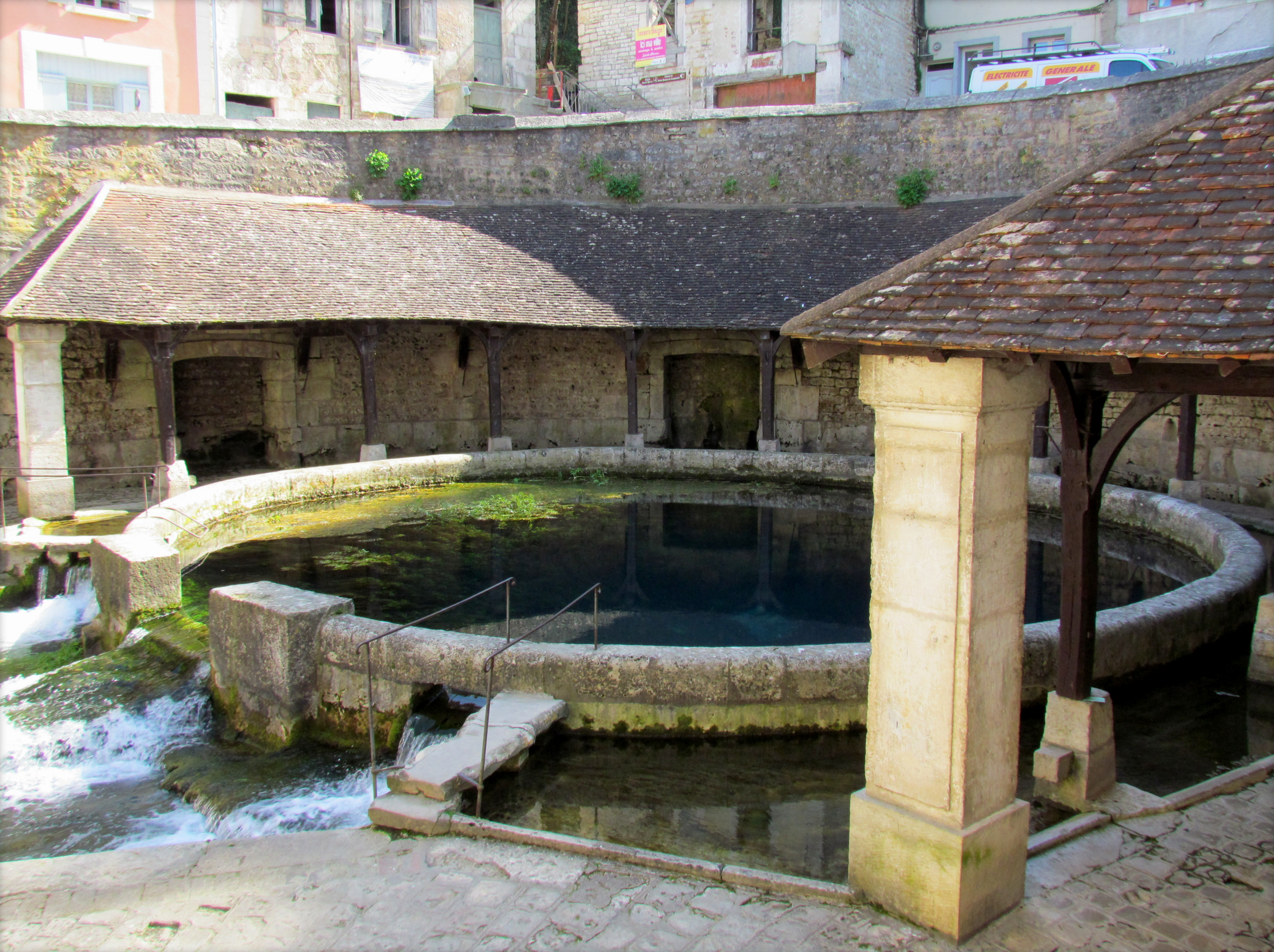 Fosse Dionne et lavoir # Tonnerre (89).